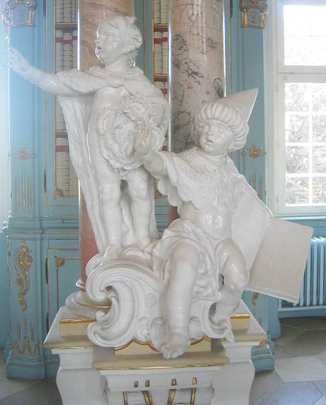 Bad Schussenried, Kloster Schussenried, Bibiothekssaal, Figuren der Irrlehren (1764-1765): Nestorianer und Arius